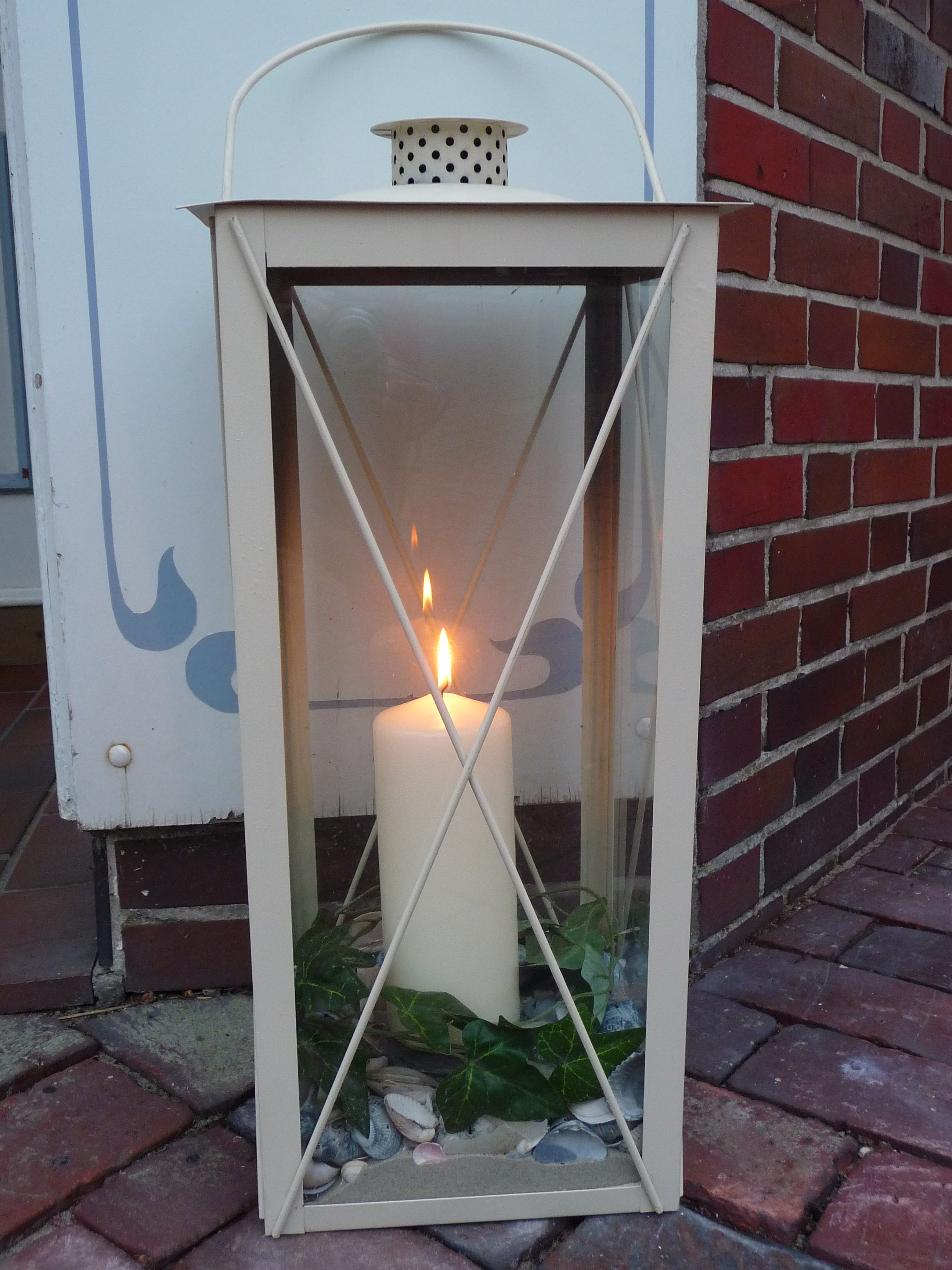 Brennende Kerze in einem Windlicht